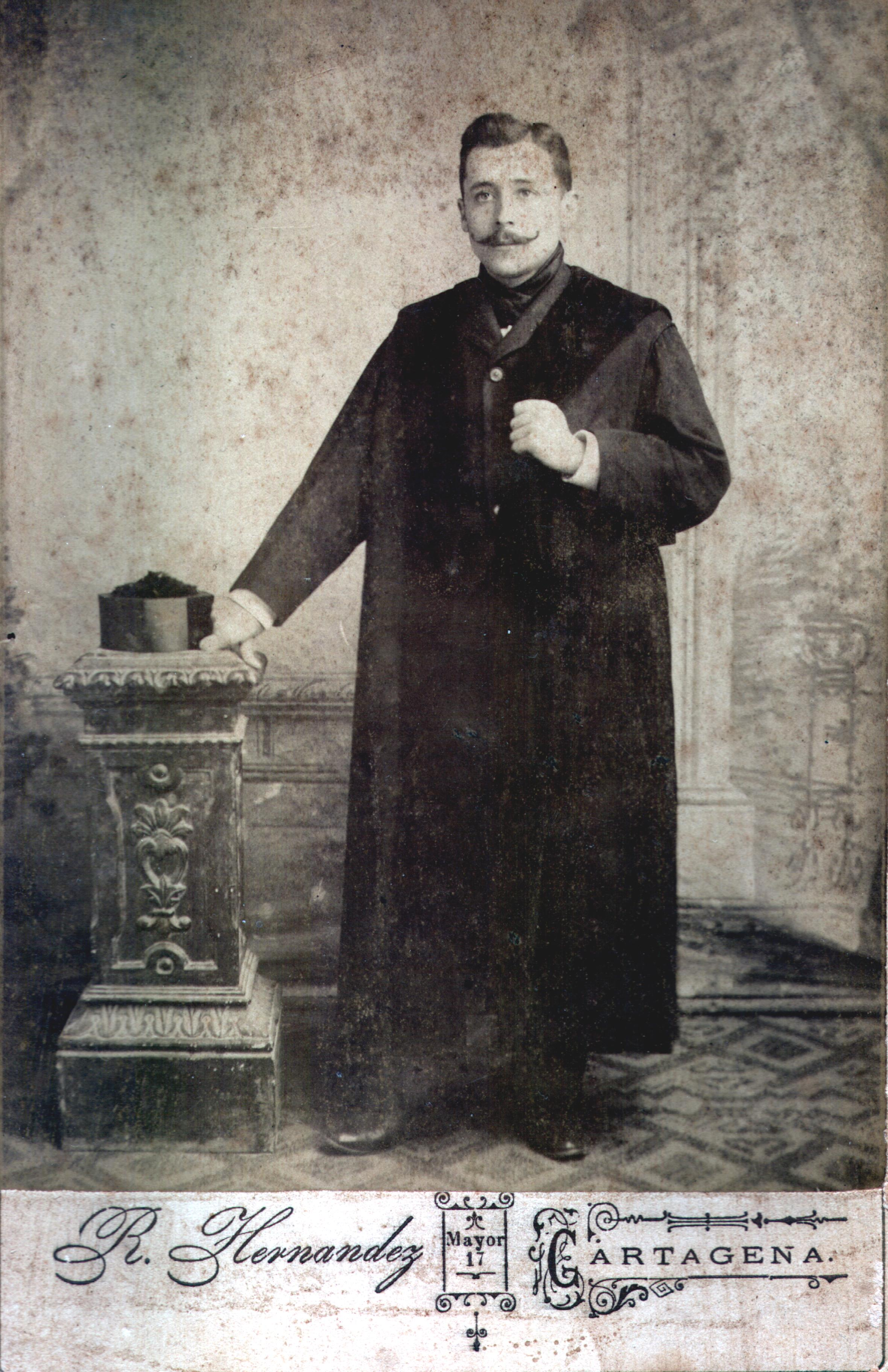 Photograph of José García Vaso, Spanish journalist and politician, just graduated in Law in 1896. The picture was taken in the studio of photographer Ricardo Hernández at number 17 of Calle Mayor of Cartagena.